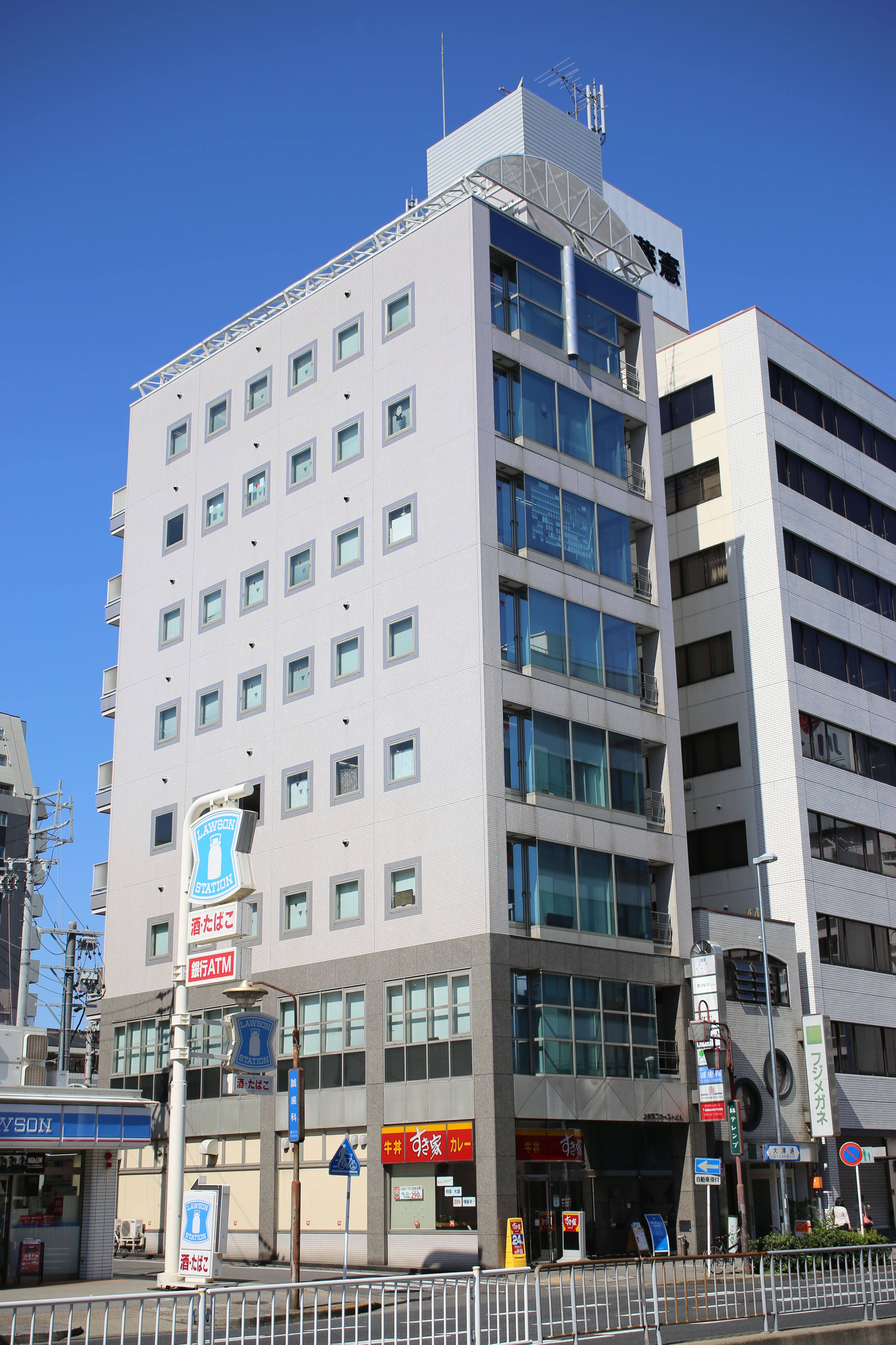 名古屋市中区上前津の上前津ファーストビルを東側公道南側より撮影